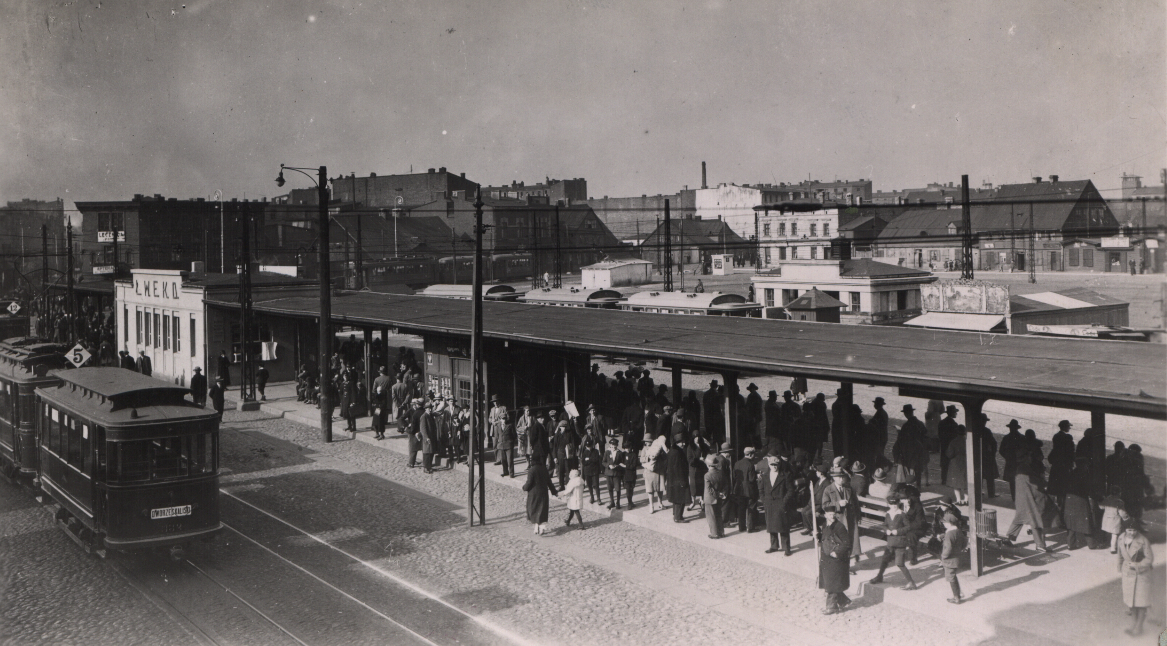 Rynek Bałucki w Łodzi – „krańcówka” tramwajowa